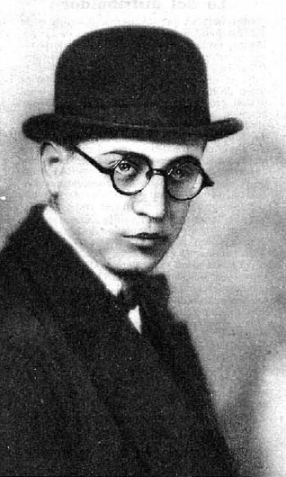 Fotografía del periodista y guionista cinematográfico español Paco Madrid publicada en 1927 para ilustrar un artículo dedicado a su labor.